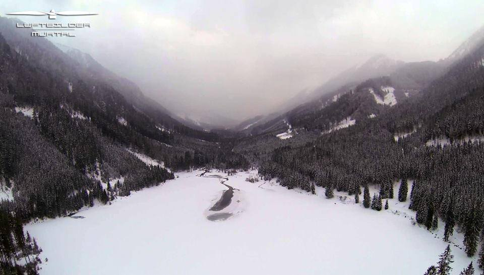 Der Ingeringsee aufgenommen im Winter 2013/14 von Luftbilder Murtal